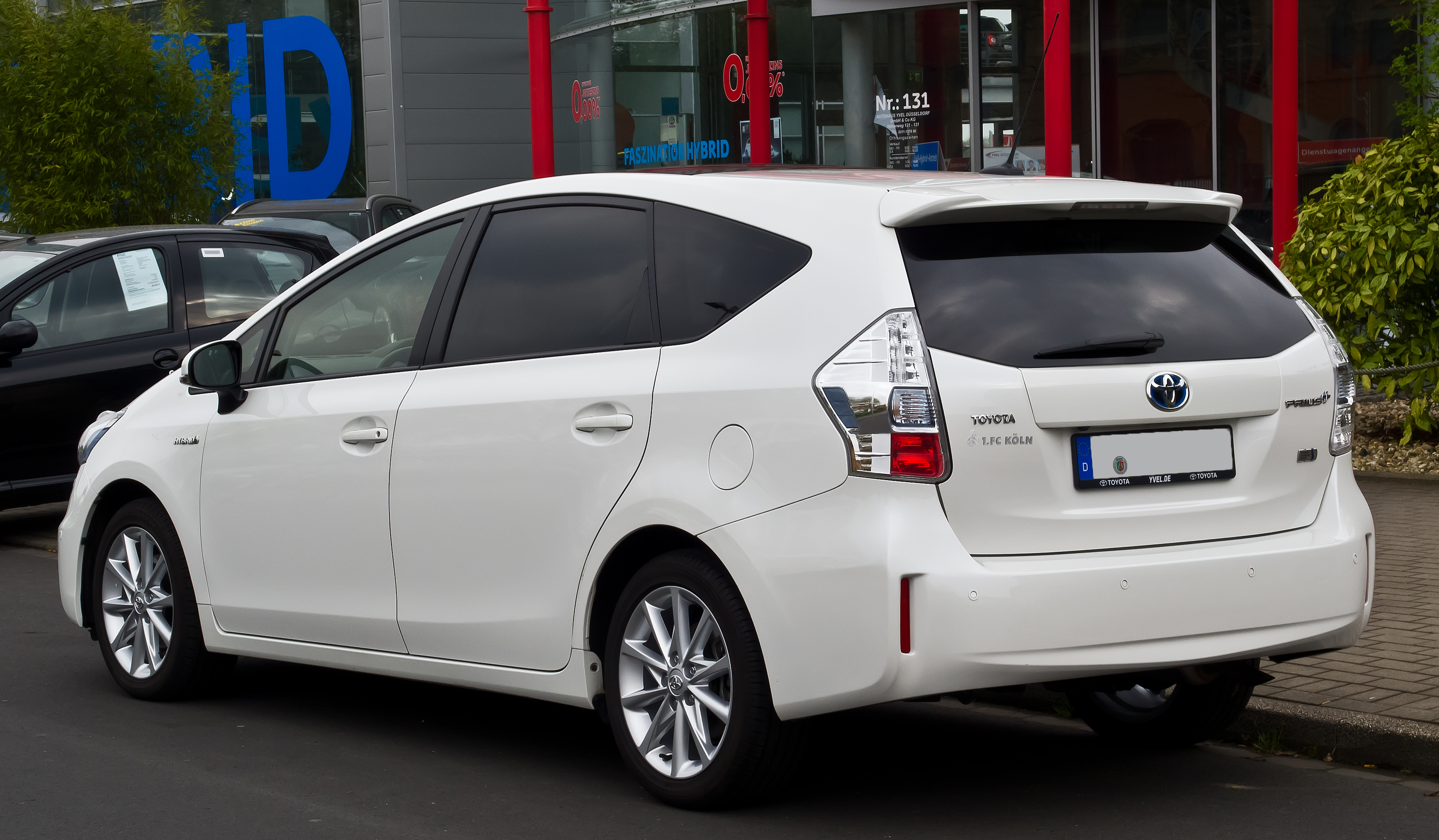 Toyota Prius+ Executive